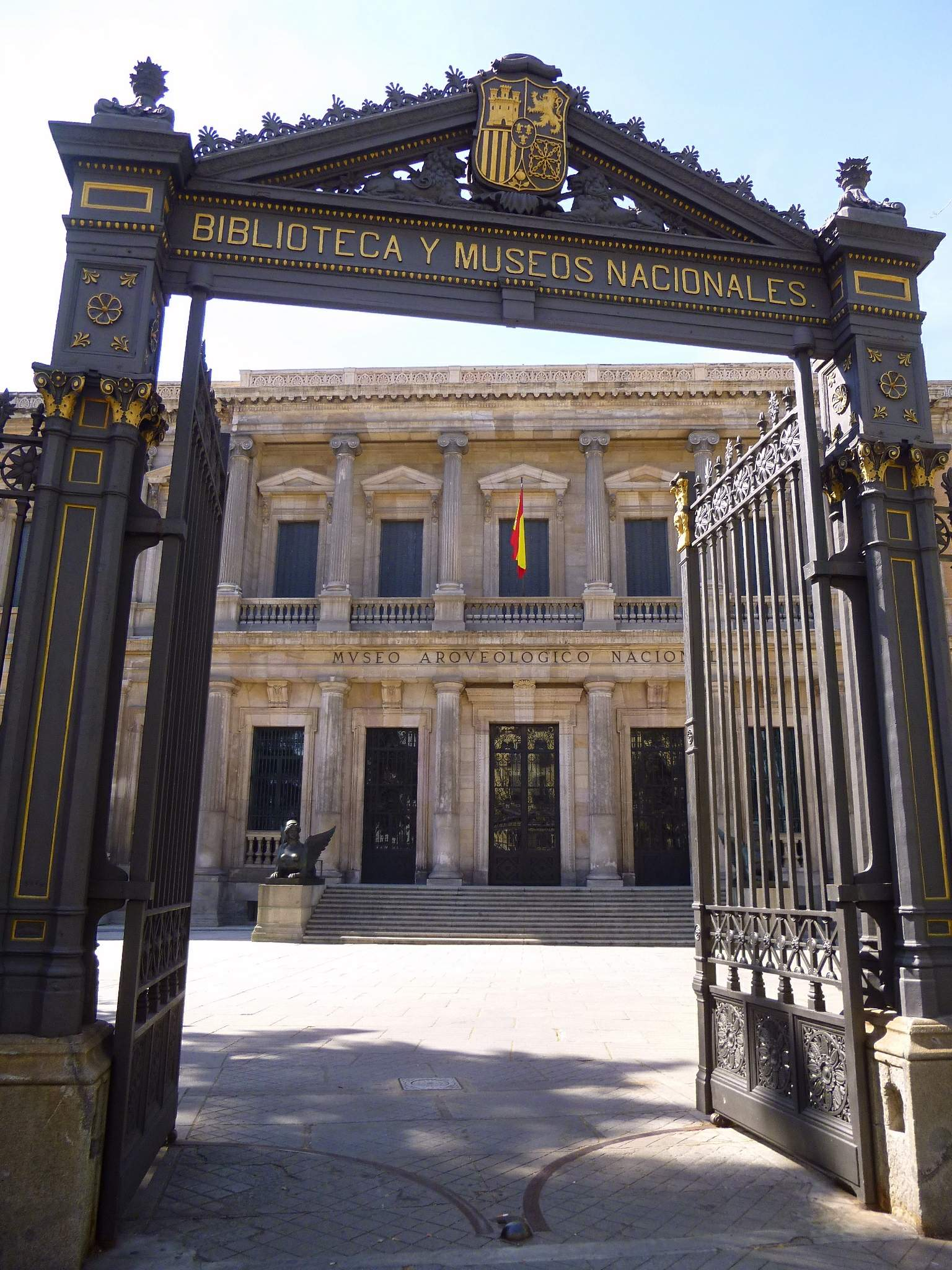 Madrid - Museo Arqueológico Nacional de España.